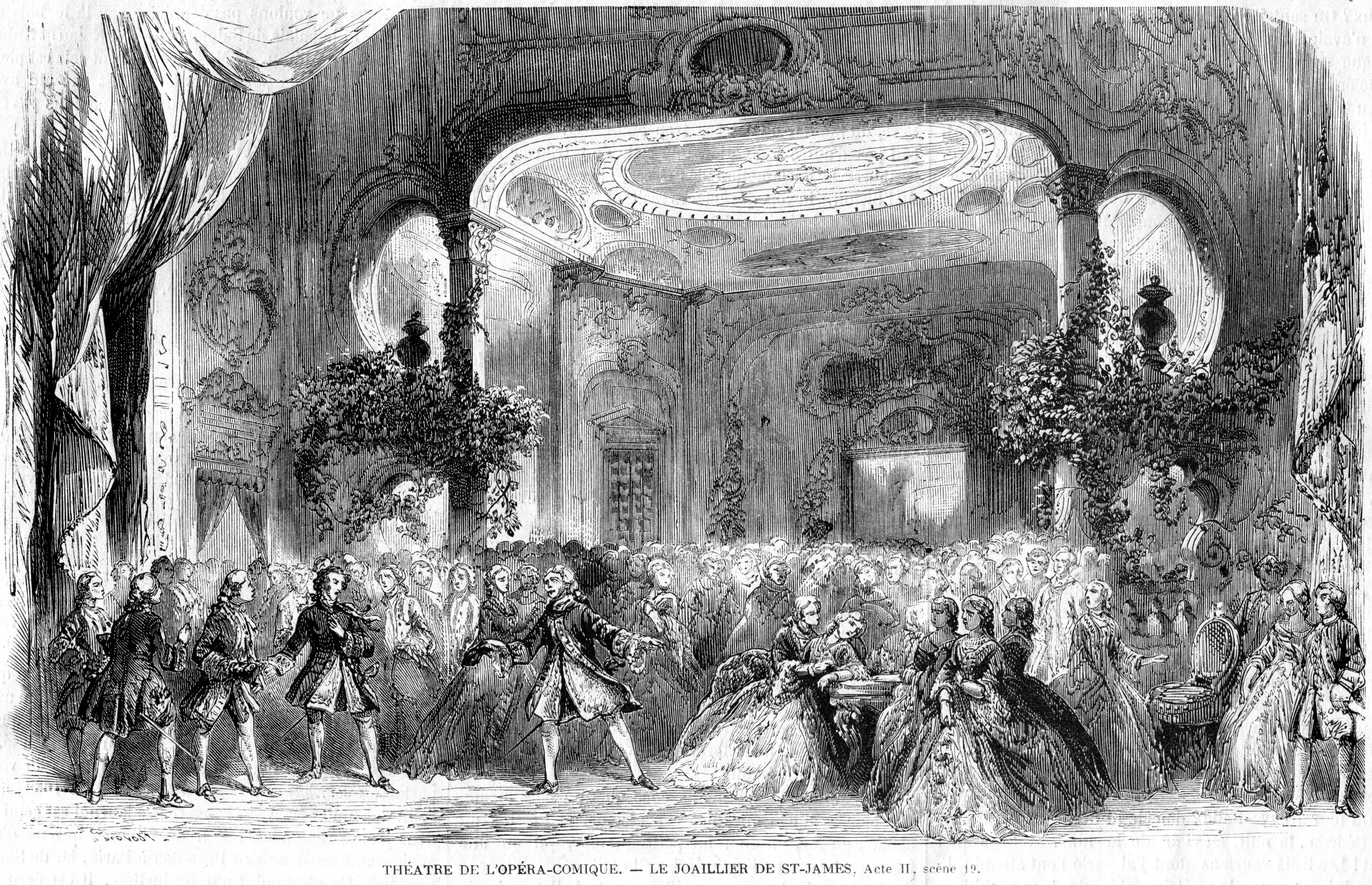 L'Illustration 1862 gravure Théatre de l'Opéra-Comique - Le Joaillier de St.-James, Acte II, scène 19. Le Joaillier de Saint-James, opéra-comique en 3 actes, textes de Jules-Henri Vernoy de Saint-Georges et Adolphe de Leuven, musique d'Albert Grisar, Paris, théâtre de l'Opéra-Comique, 17 février 1862